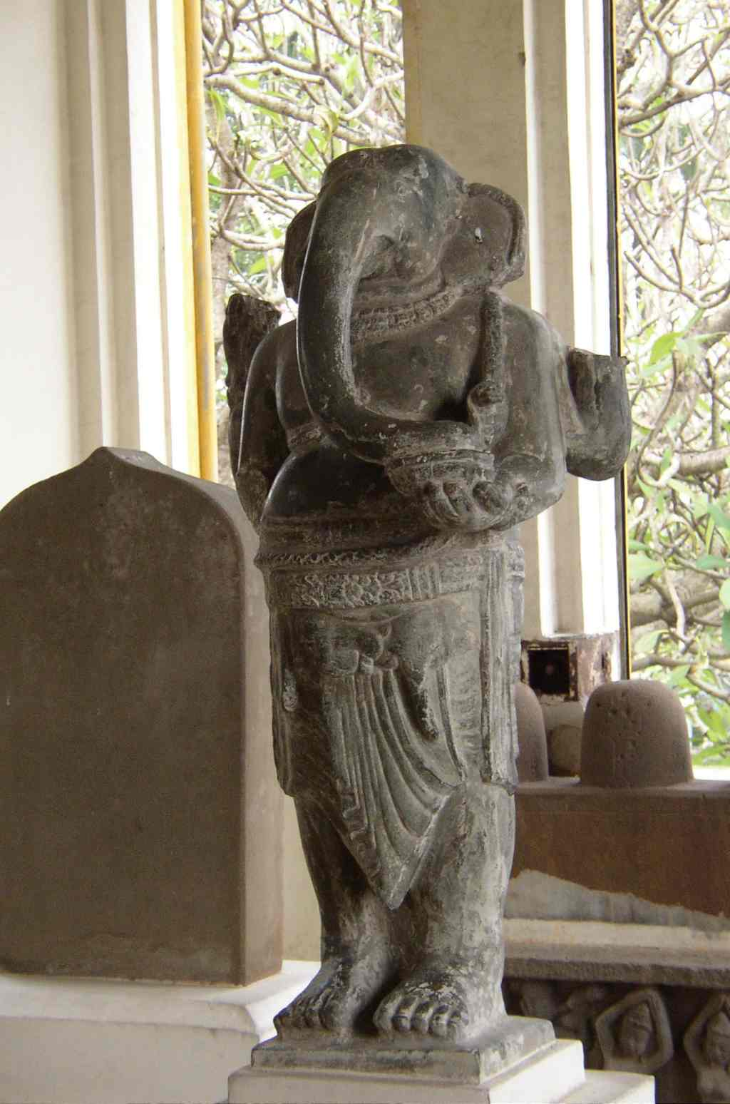 Ganesha-Statue im Cham-Museum in Da Nang (Vietnam)